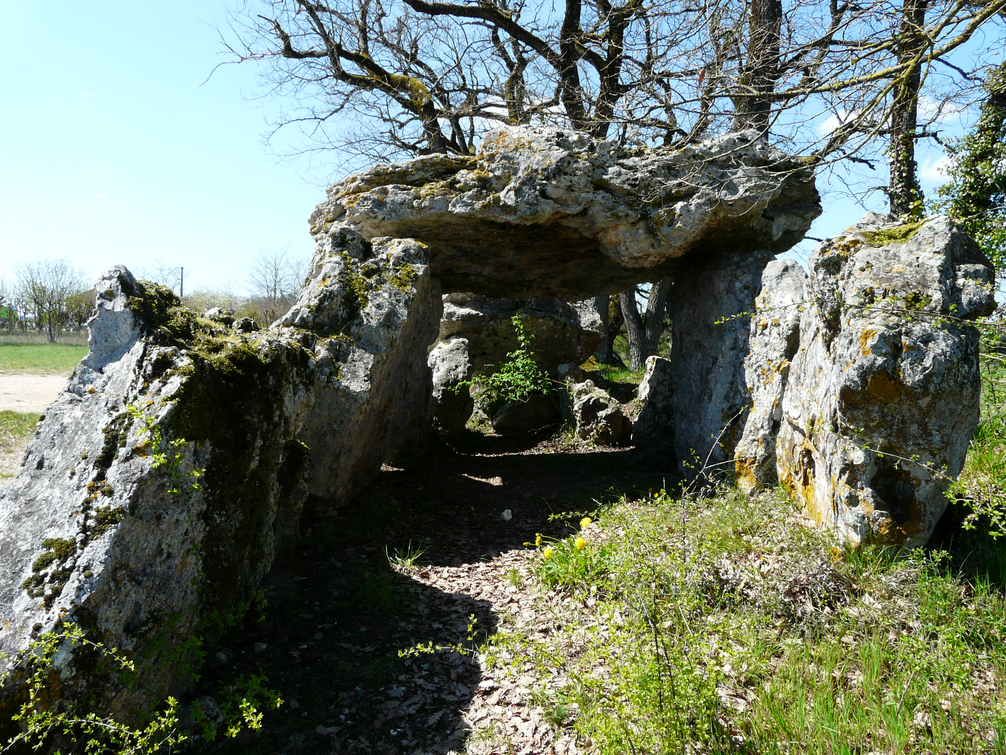 L'allée couverte du Blanc, Nojals-et Clotte, Dordogne, France.